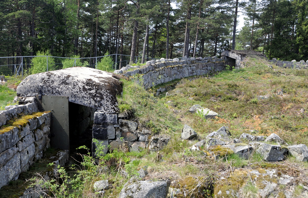 Brystvernet ved Ravneberget fort